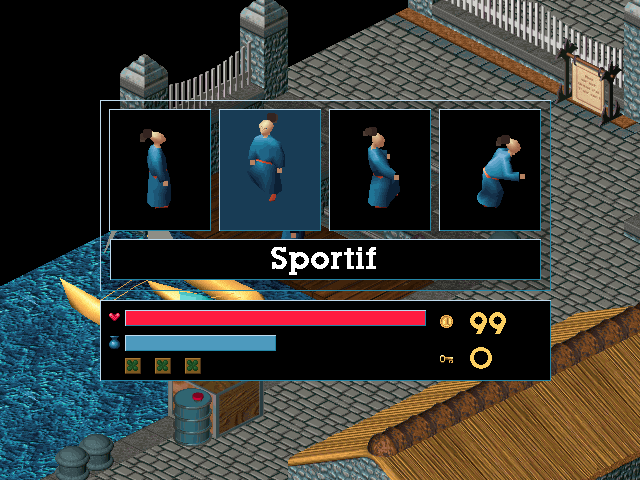 Capture d'écran du jeu vidéo Little Big Adventure (1994), développé par Adeline Software International.